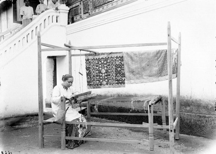 Negatief. Vrouw aan weefstoel, Padangse Bovenlanden